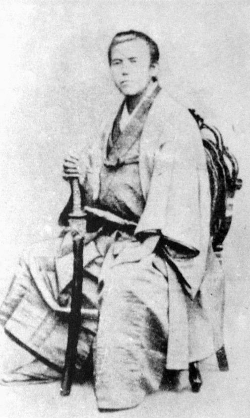 a Japanese man 木戸孝允 (Takayoshi Kido)